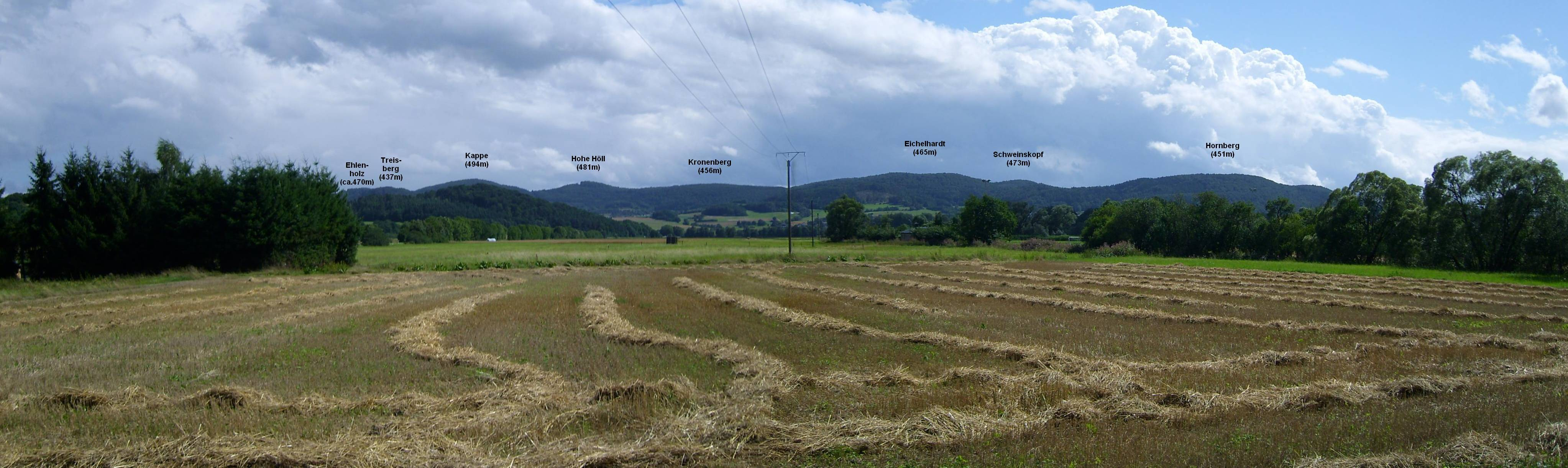 Blick von der Lahnaue bei Kombach auf die nordwestlichen Damshäuser Kuppen mit (vrnl) Hornberg (451m), Schweinskopf (473m, teils verdeckt), Eichelhardt (465m), Kronenberg (456m), Hohe Höll (481m) und Kappe (494m, teils verdeckt) – Fotostandort: 50.8738°N, 8.55342°E